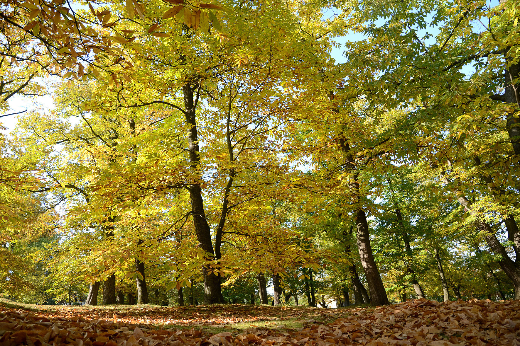 Kaštanka